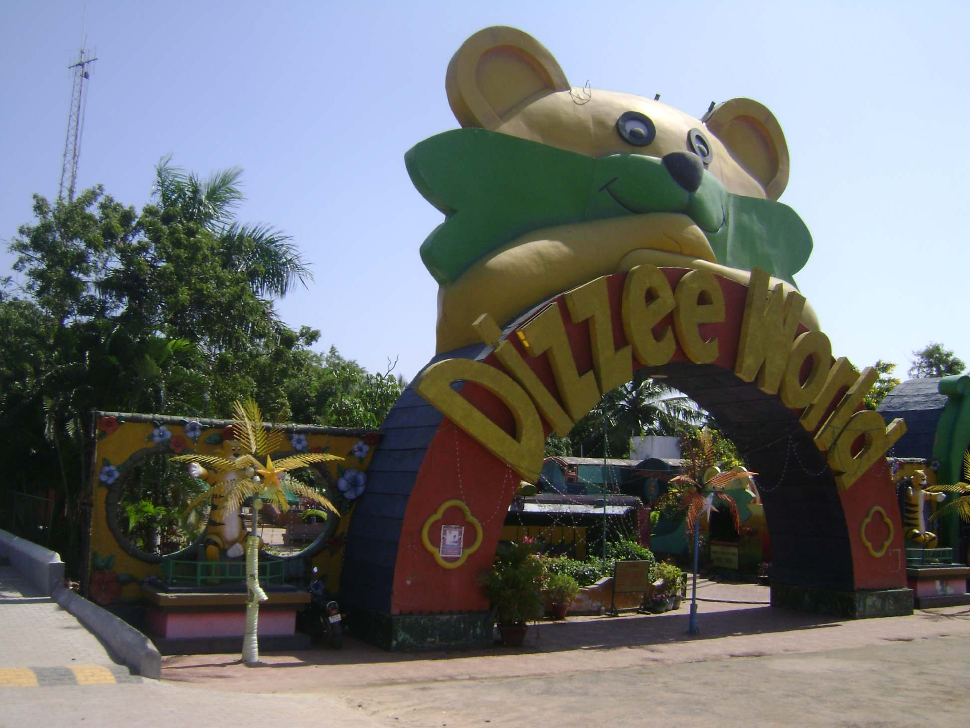 MGM Dizzee World Amusement Park, Chennai